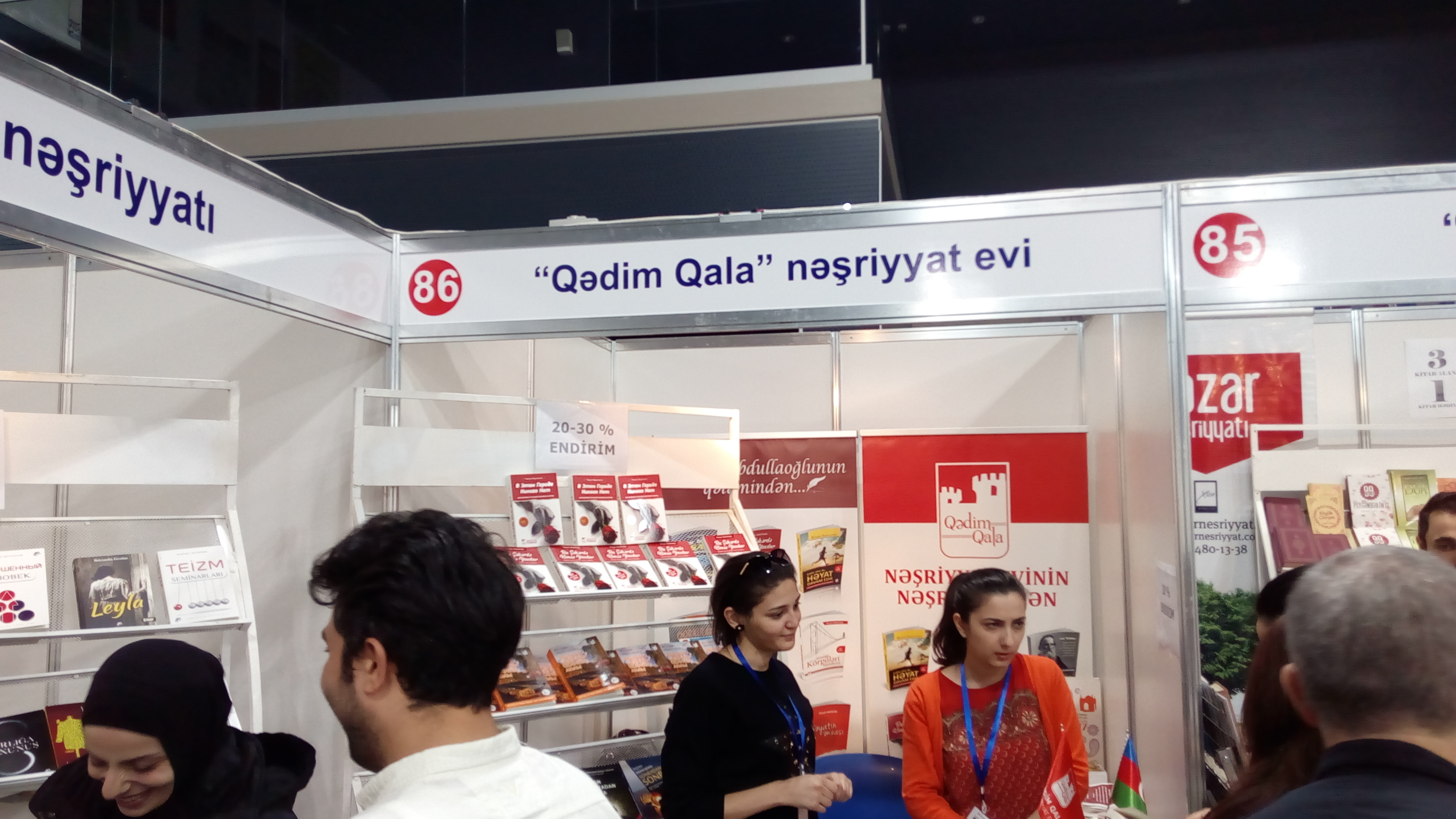 V Bakı Beynəlxalq Kitab Sərgi-Yarmarkası